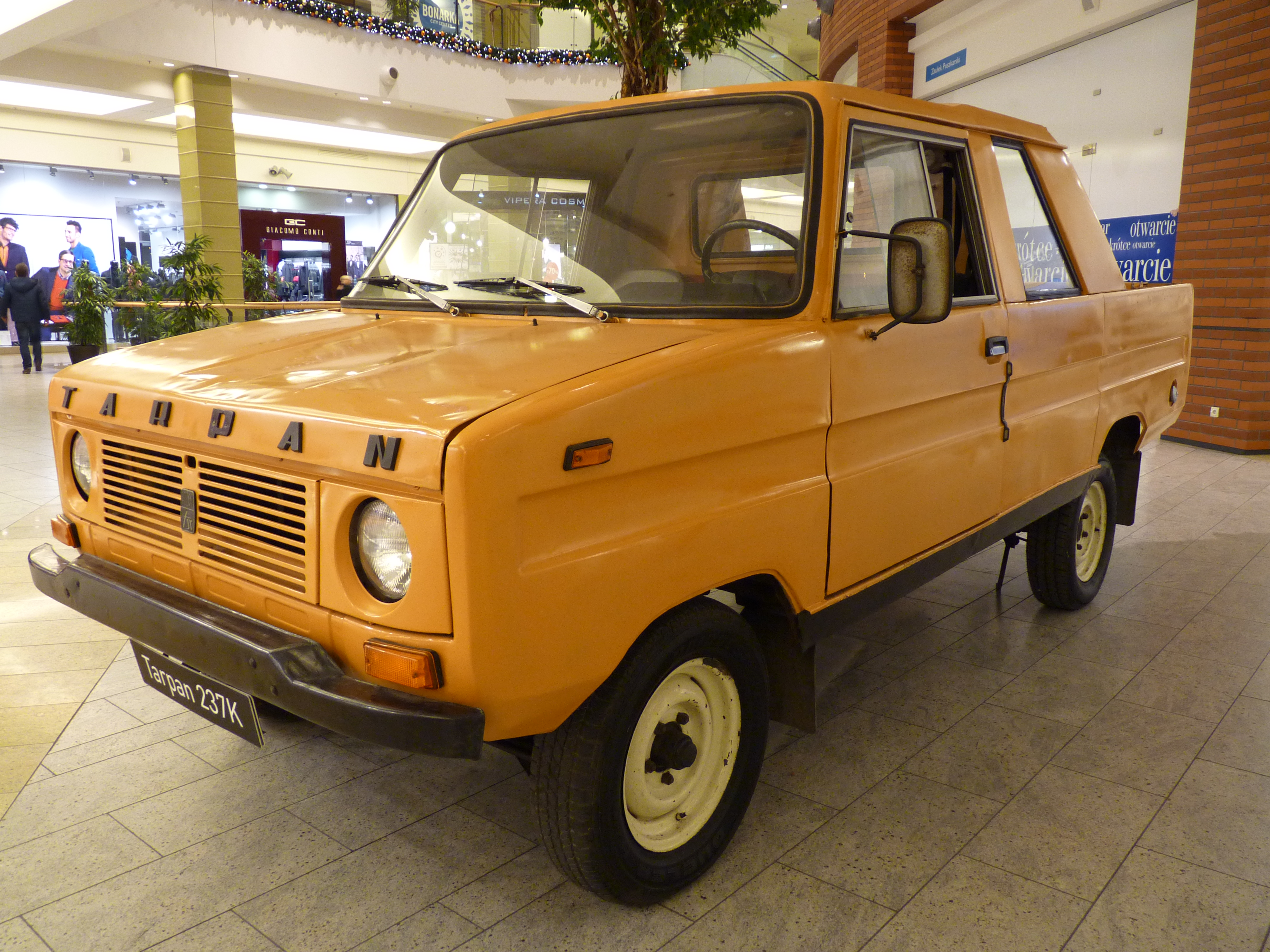 FSR Tarpan 237S during „XXX lat motoryzacji PRL” exhibition at Bonarka City Center in Kraków.